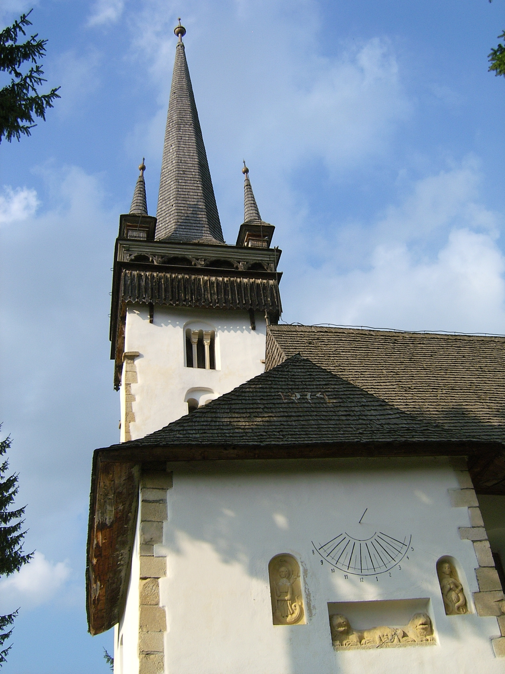 A magyargyerőmonostori református templom (napórával)